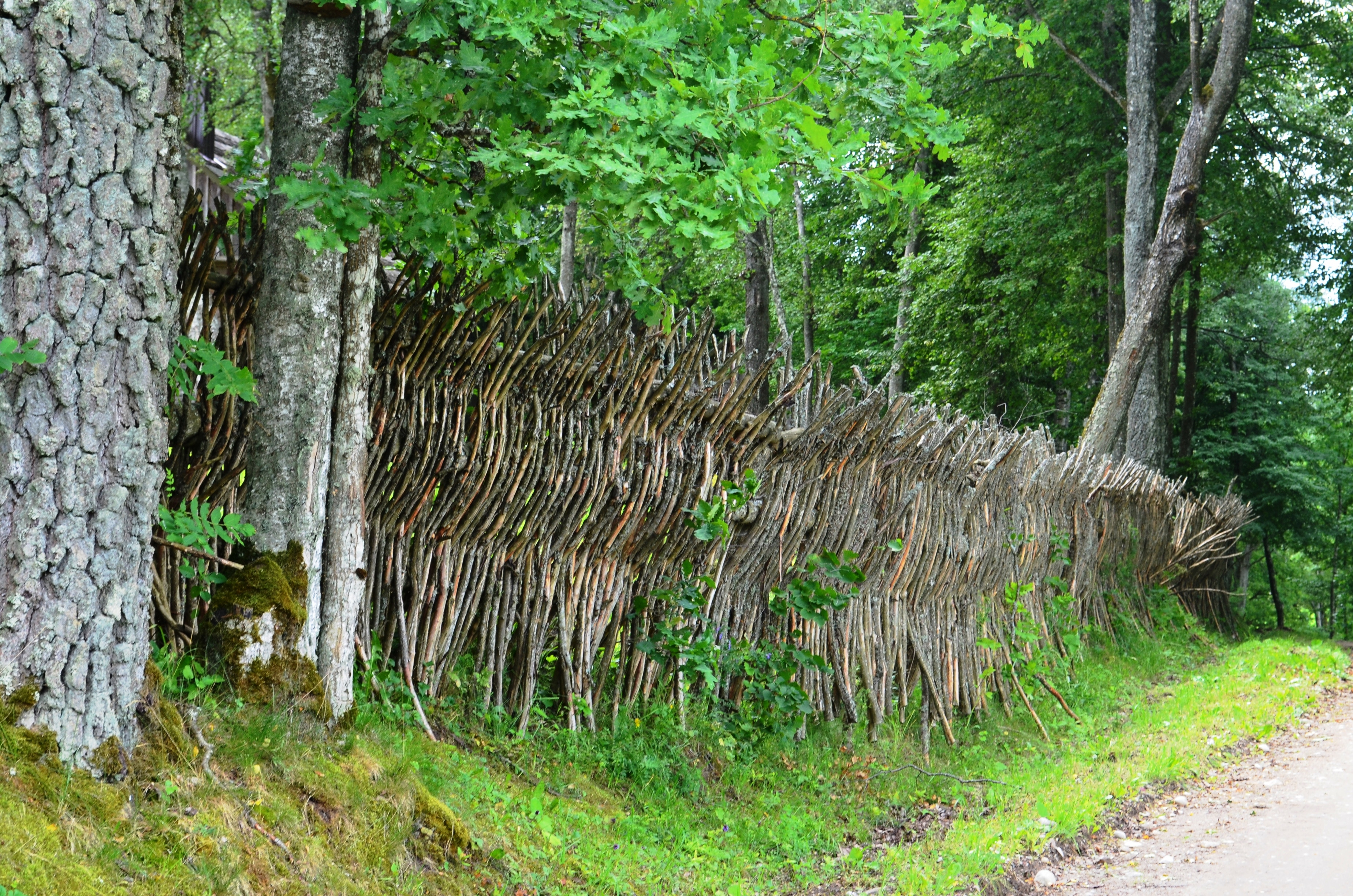 Žemaitiška žagrių tvora, Bilioniai, Šilalės r. Žemaitėška: Žemaitėška žagriu tuora Bėlioniūs, Šėlalės raj.